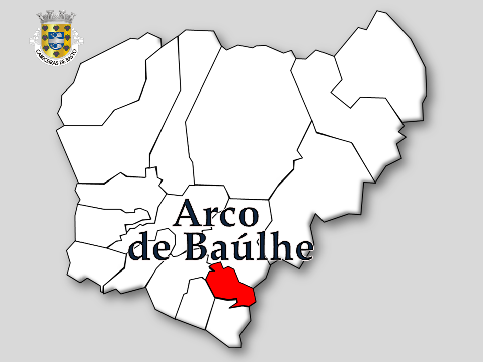 Censos 1864/2011